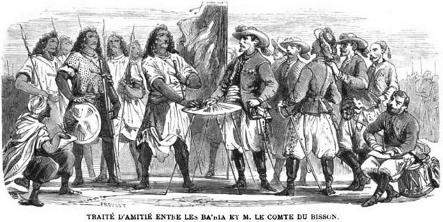 "Traité d'amitié entre les Ba'ria[s] et M. le comte du Bisson".